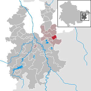 Braunichswalde in Thuringia - District Greiz